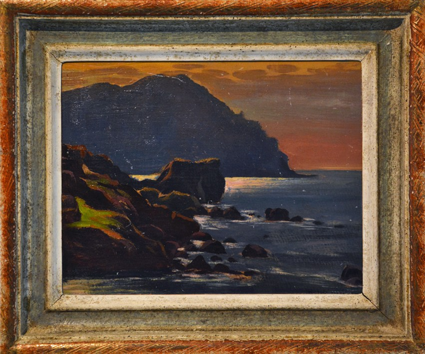 Kuestenlandschaft von Robert Schiess